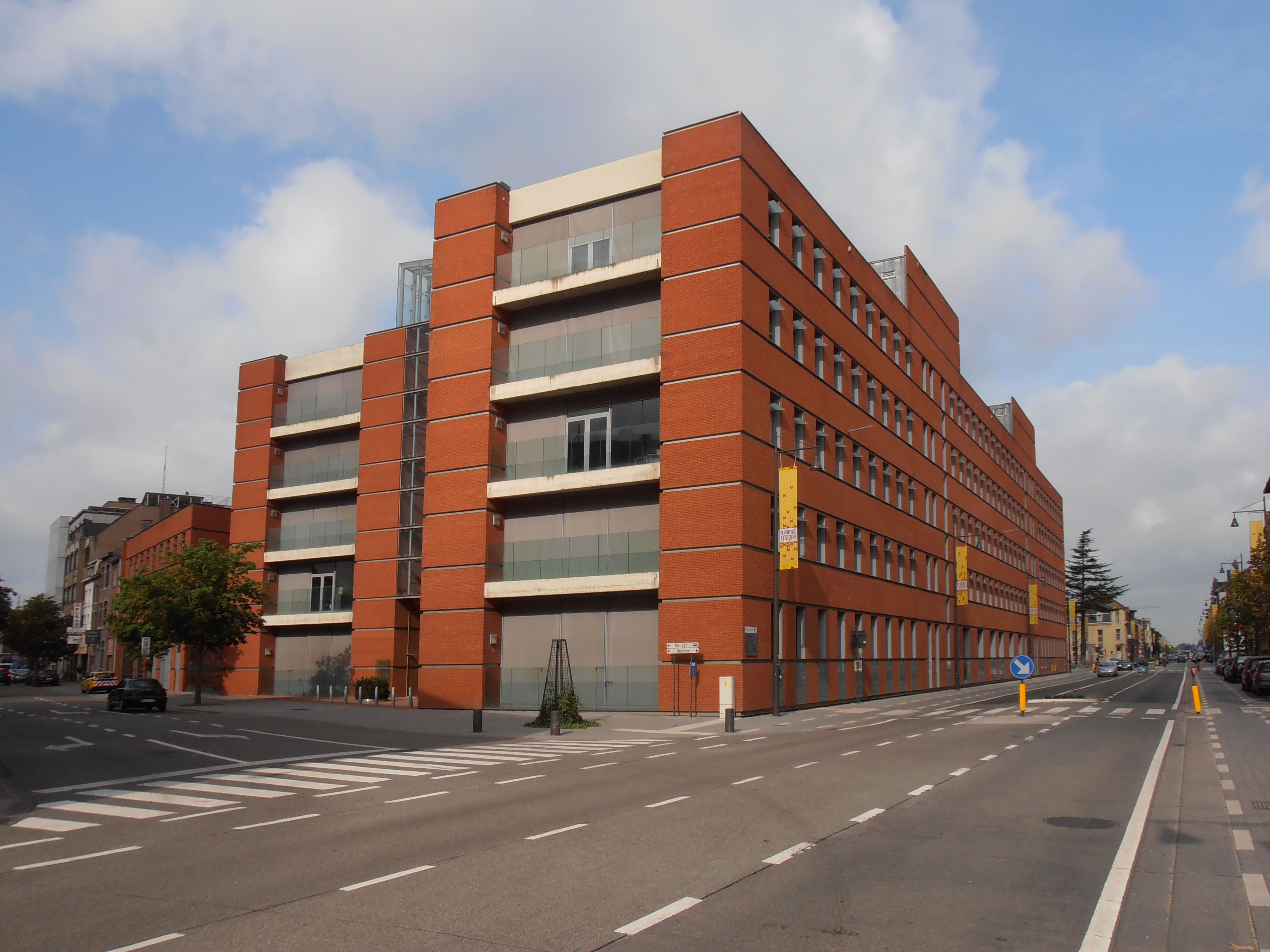 Het Vlaams Huis in Hasselt, waar alle diensten van het Vlaams Gewest (België) die betrekking hebben op de provincie Limburg gevestigd zijn.